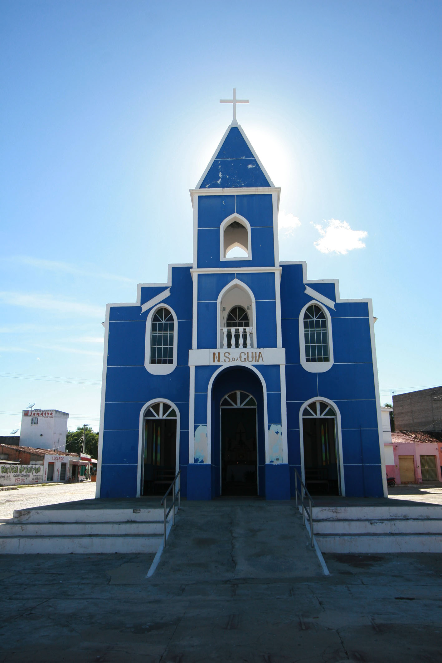 Igreja N Sª da Guia, Ibotirama